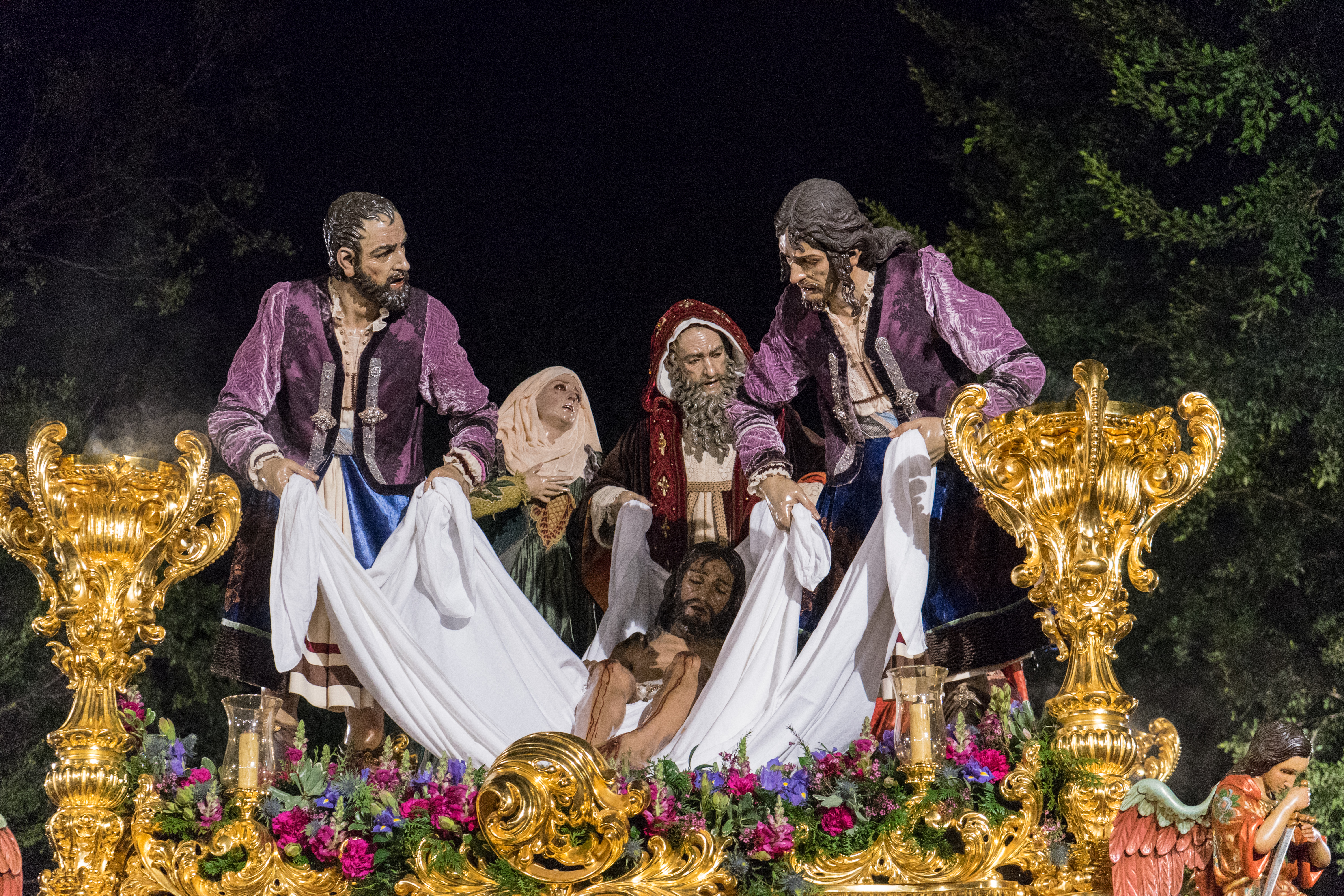 Trono del Traslado de la Real, Ilustre y Venerable Hermandad del Santo Traslado y Nuestra Señora de la Soledad This is a photography of a Folklore festival in Spain (Wikidata id Q9075883).